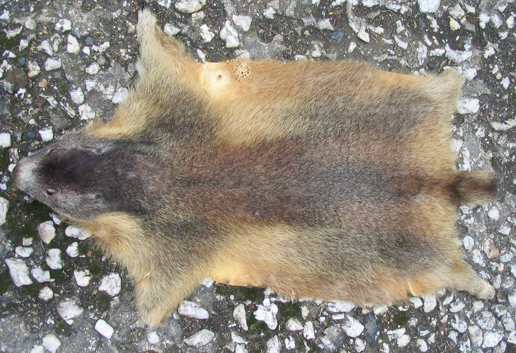 Murmelfell. Provenienz Tirol. Erlegt von Karl Friedrich Herhold vor etwa 20 Jahren oder eher.